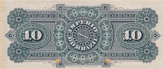 10 мильрейсов. Бразильская империя. Реверс. Герб империи.